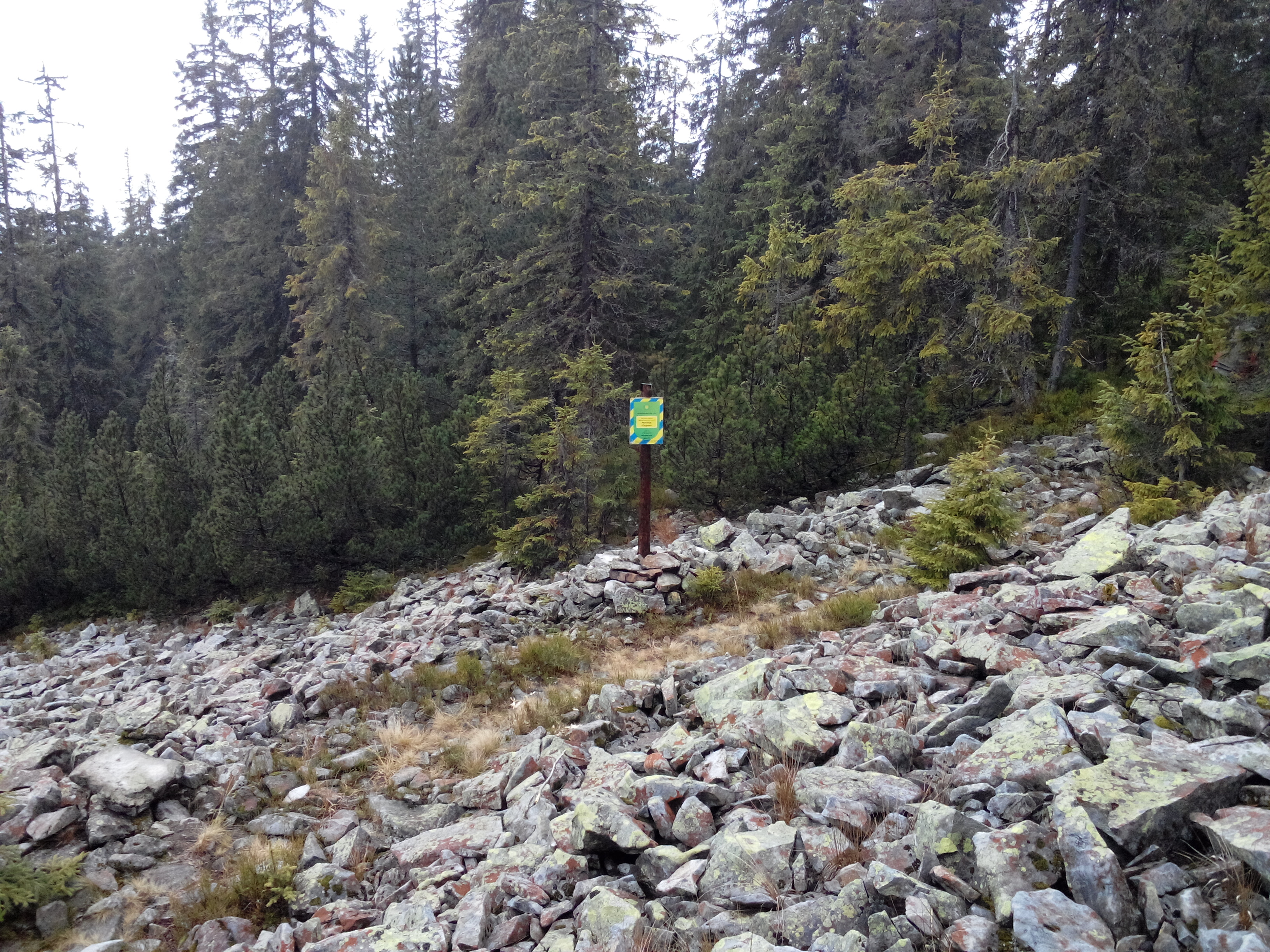 На райтштоці, що траверсує г. Кінець Ґорґанів